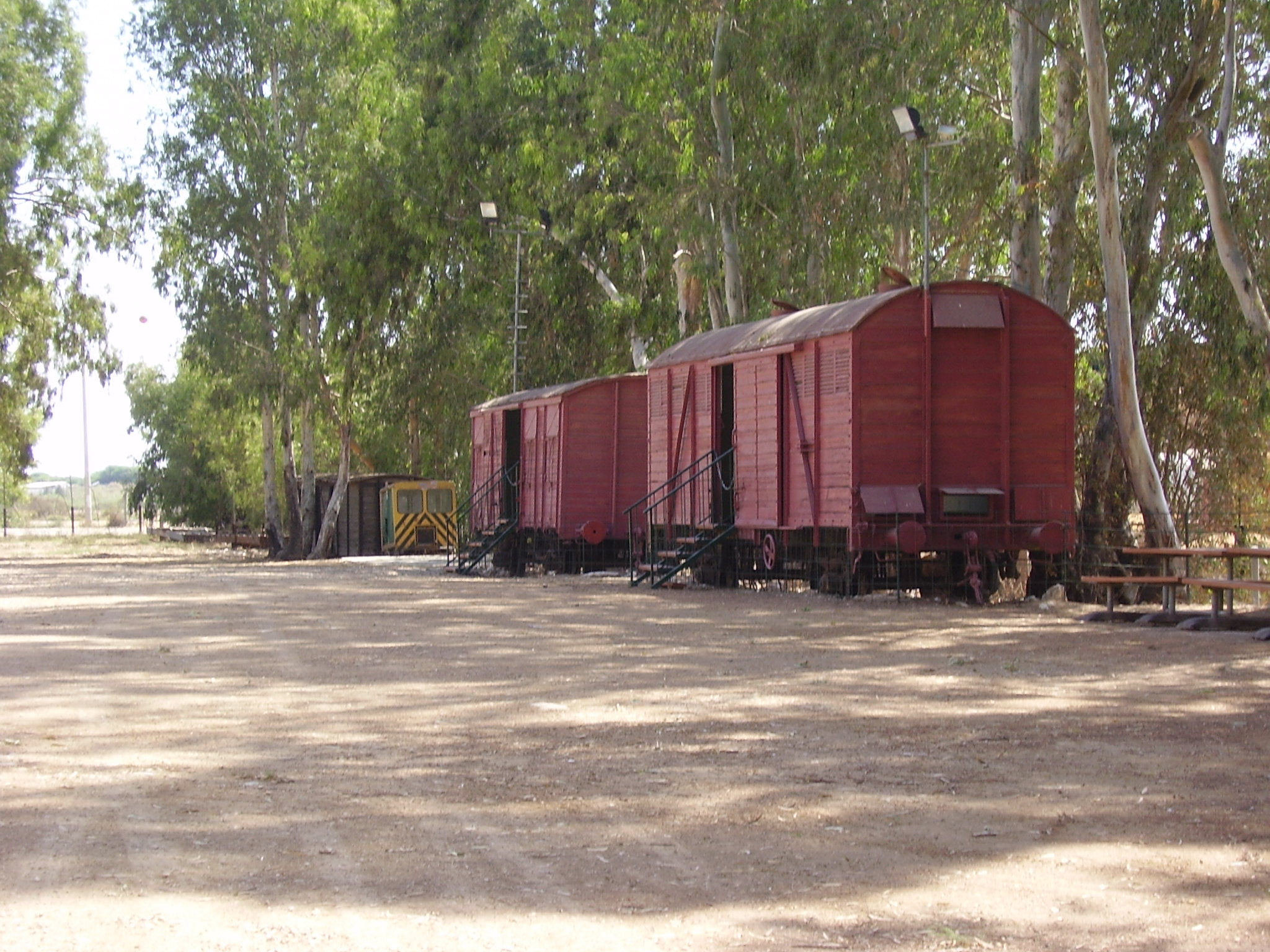 קרונות בתחנת רכבת העמק בכפר יהושע